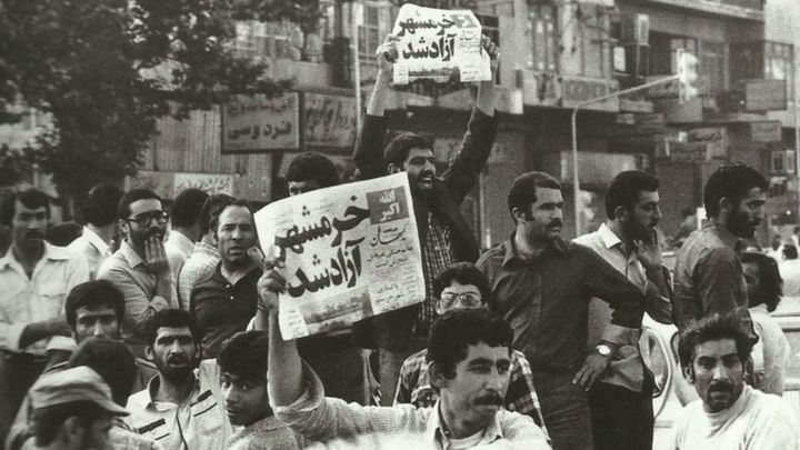 آزدای خرمشهر – خرداد 1361 خورشیدی